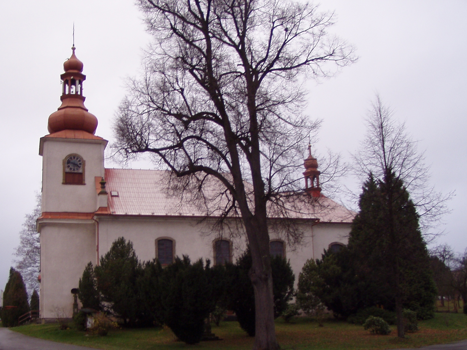 Kostel sv. Petra a Pavla (Dobré)